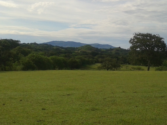 Vista del Canajagua desde Las Guabas